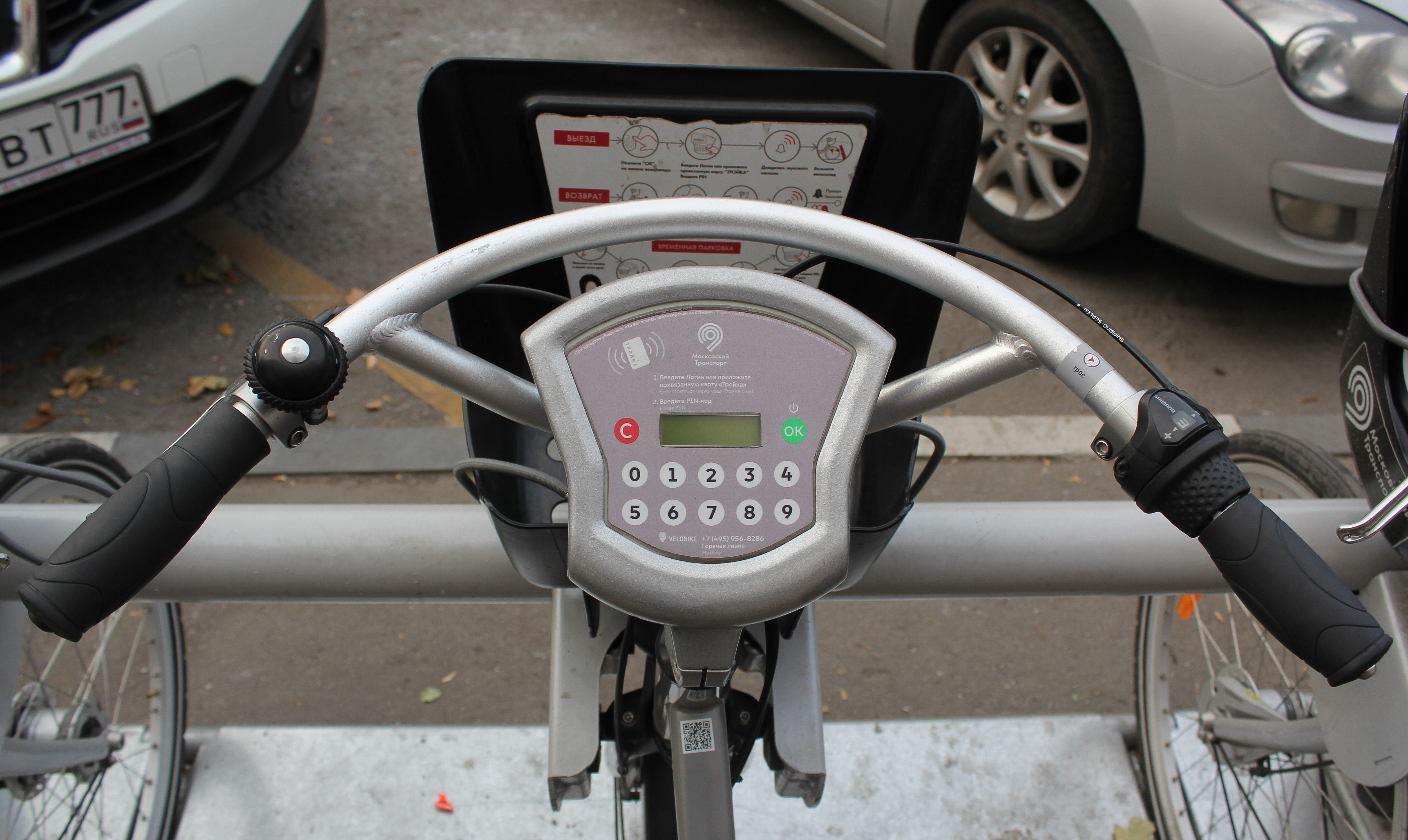 Руль велосипеда сервиса проката велосипедов в Москве Velobike